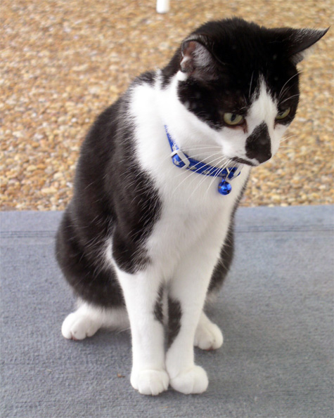 I'm V for Vendetta.